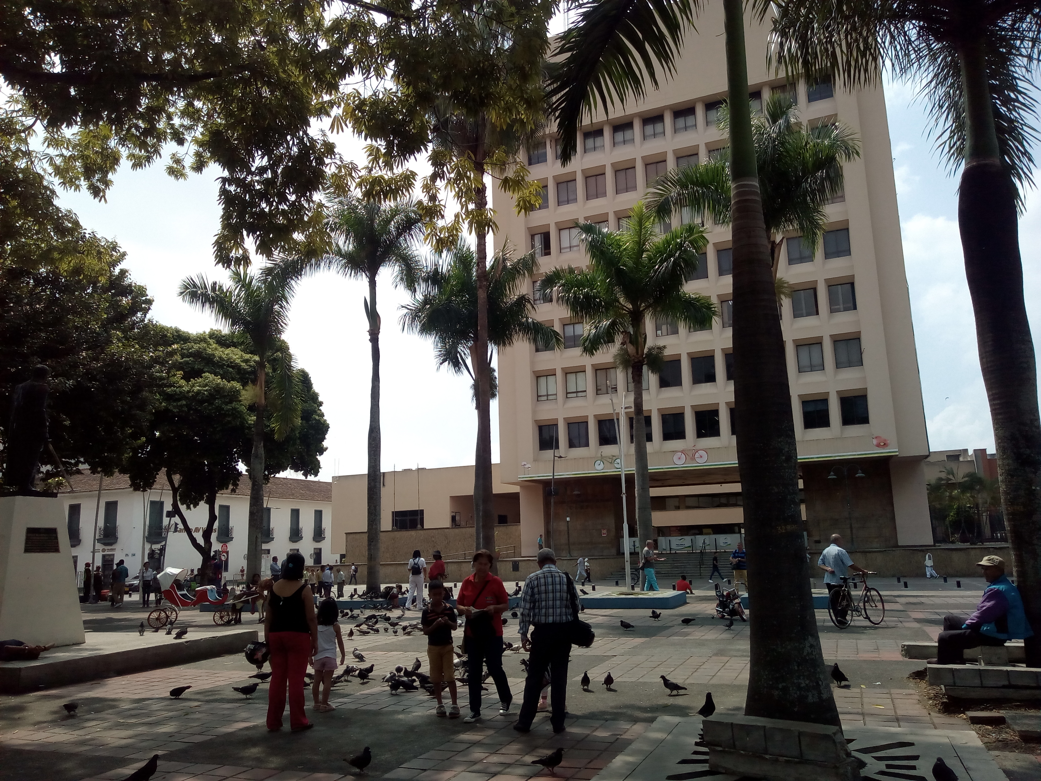 Tomada desde Parque Bolívar